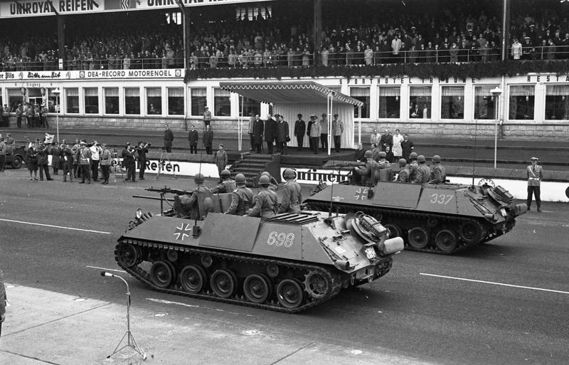 20 Jahre NATO. Bundeswehrparade auf dem Nürburgring.